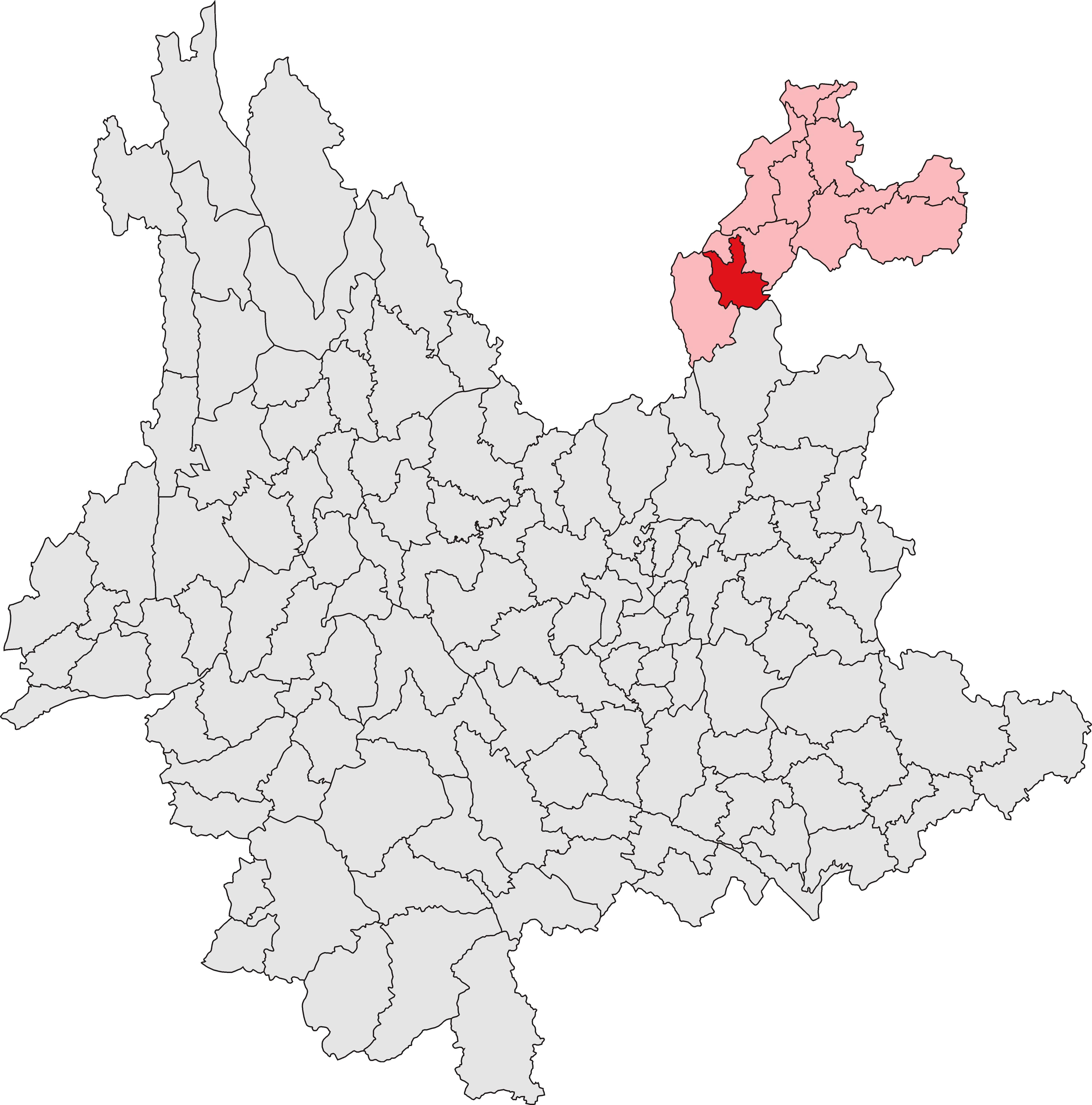 鲁甸县位置图